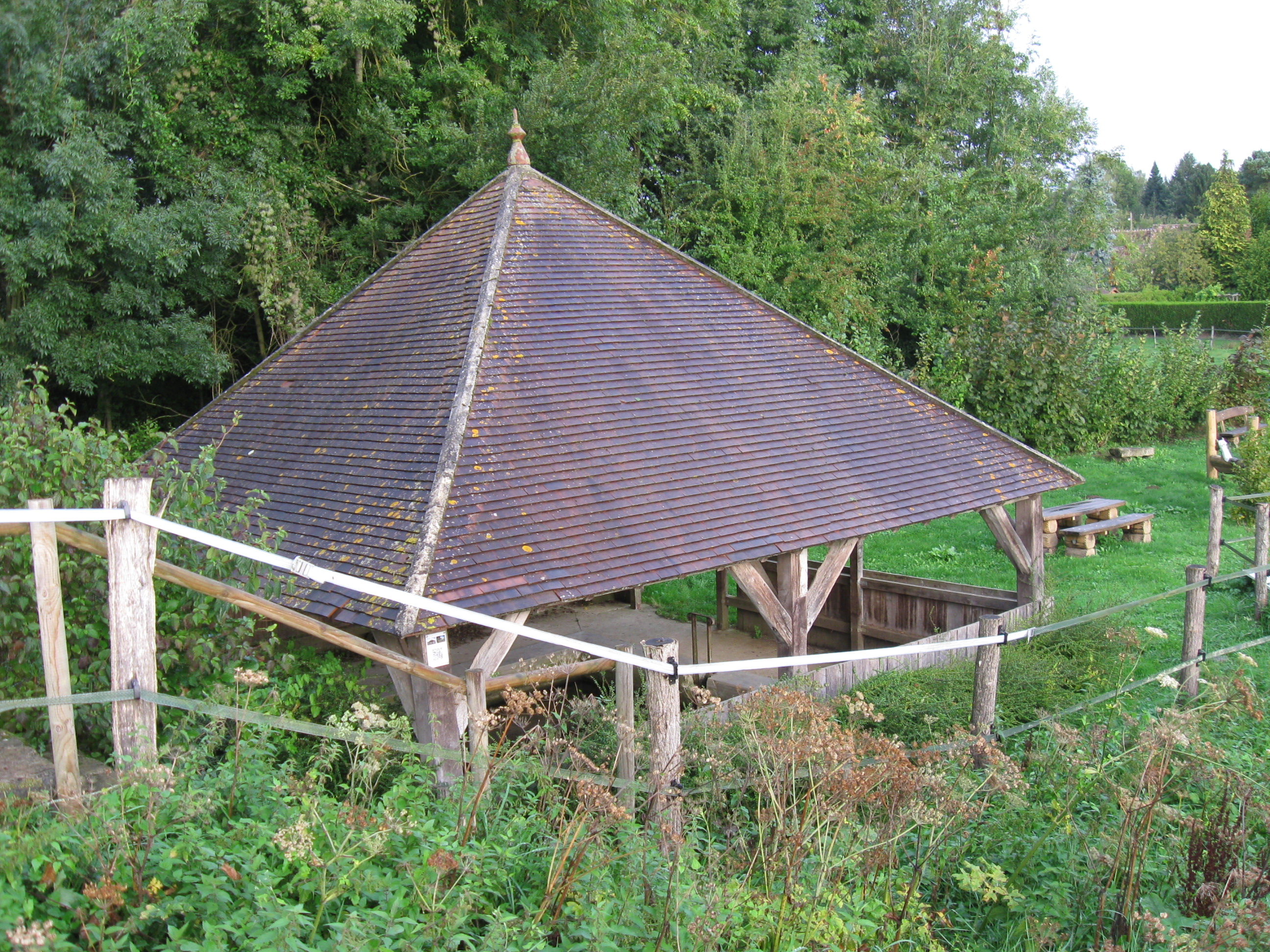 Lavoir à Chalautre-la-Reposte, commune de Gurcy-le-Châtel.(Seine-et-Marne, région Île-de-France).